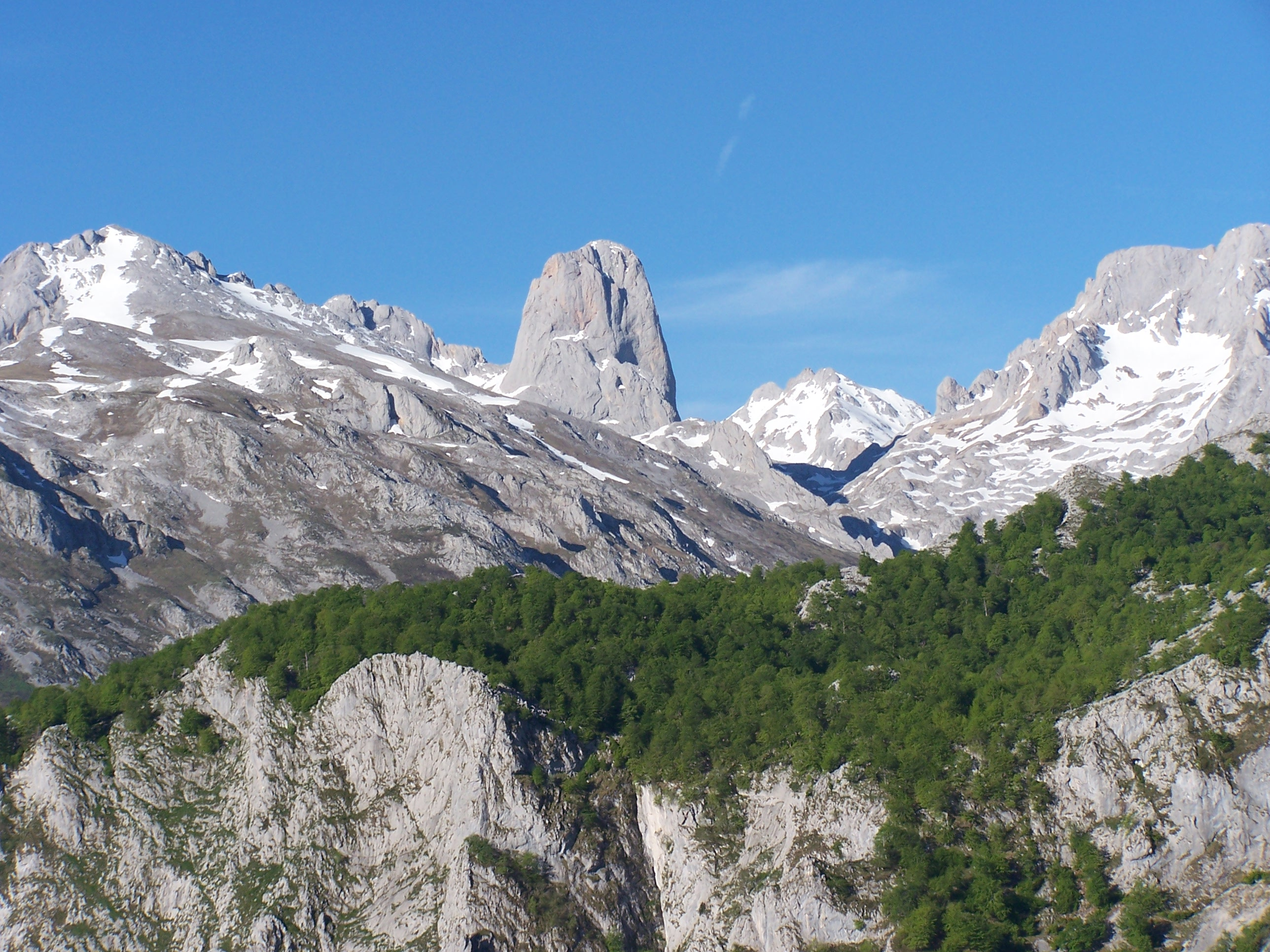 Picos de Europa This is a photography of a Site of Community Importance in Spain with the ID: ES1200001. Natura2000 entry, EEA entry